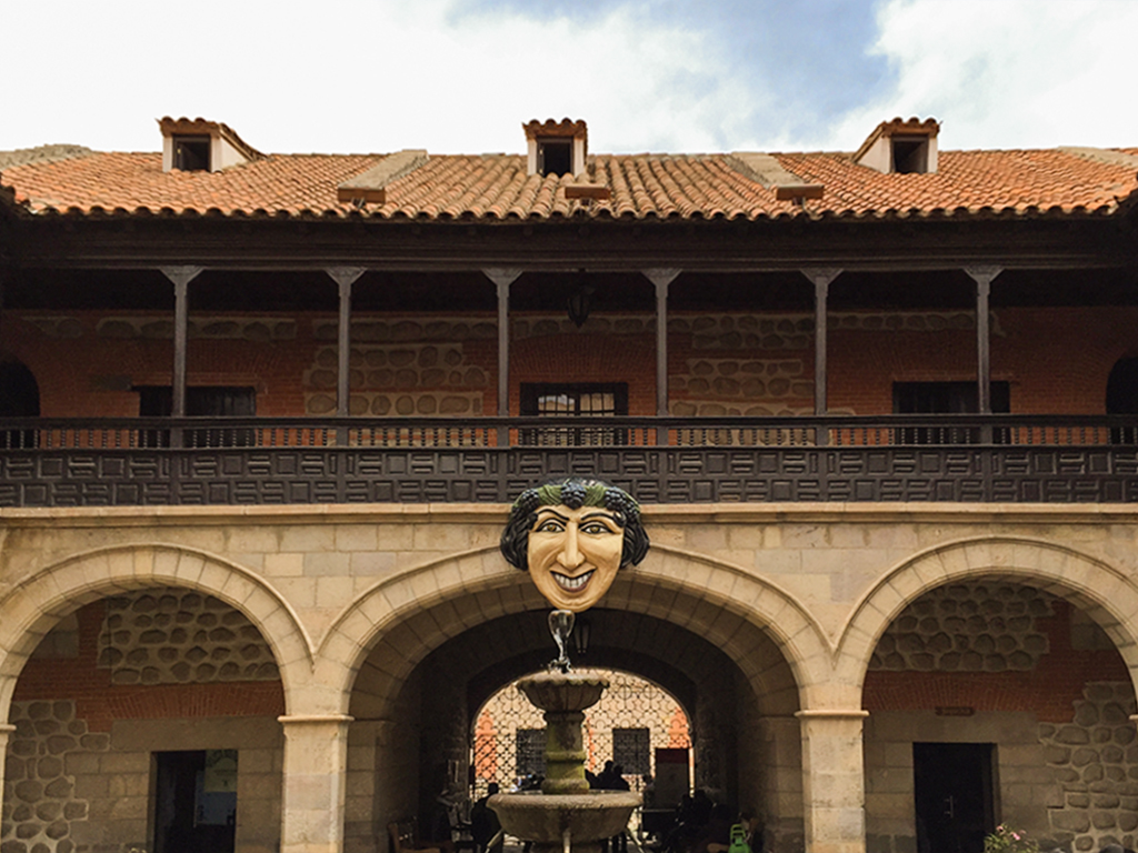 Patio principal la Casa de la Moneda de Potosí, Bolivia